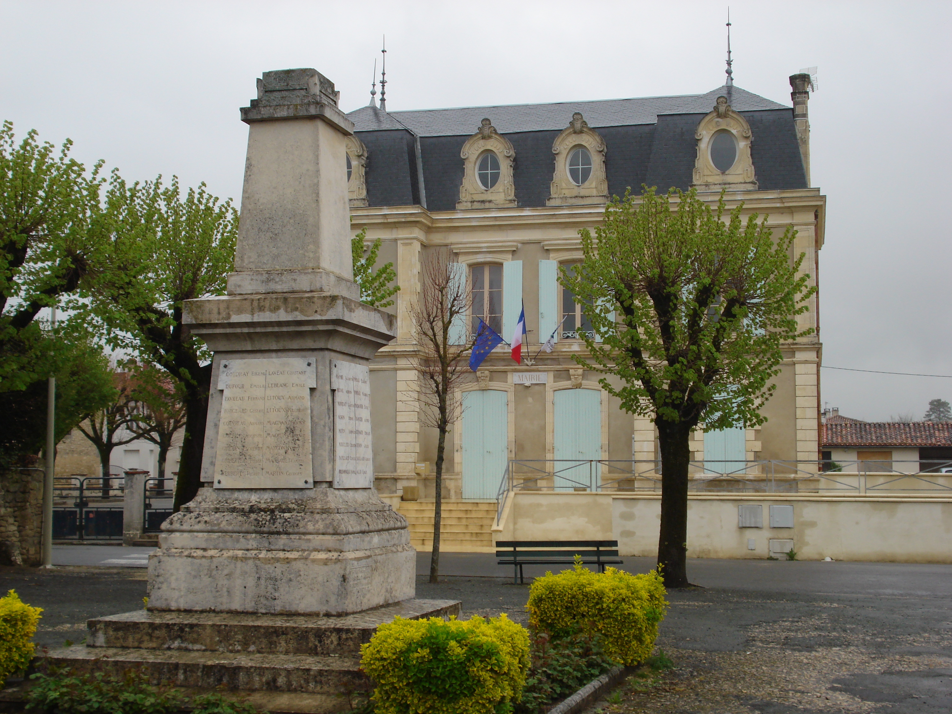 Mairie et Monument aux morts de Néré (Charente-Maritime)